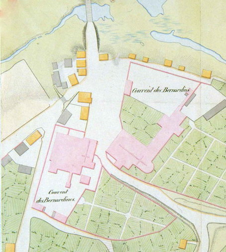 Агульны план бернардзінскіх кляштароў у Брэсце